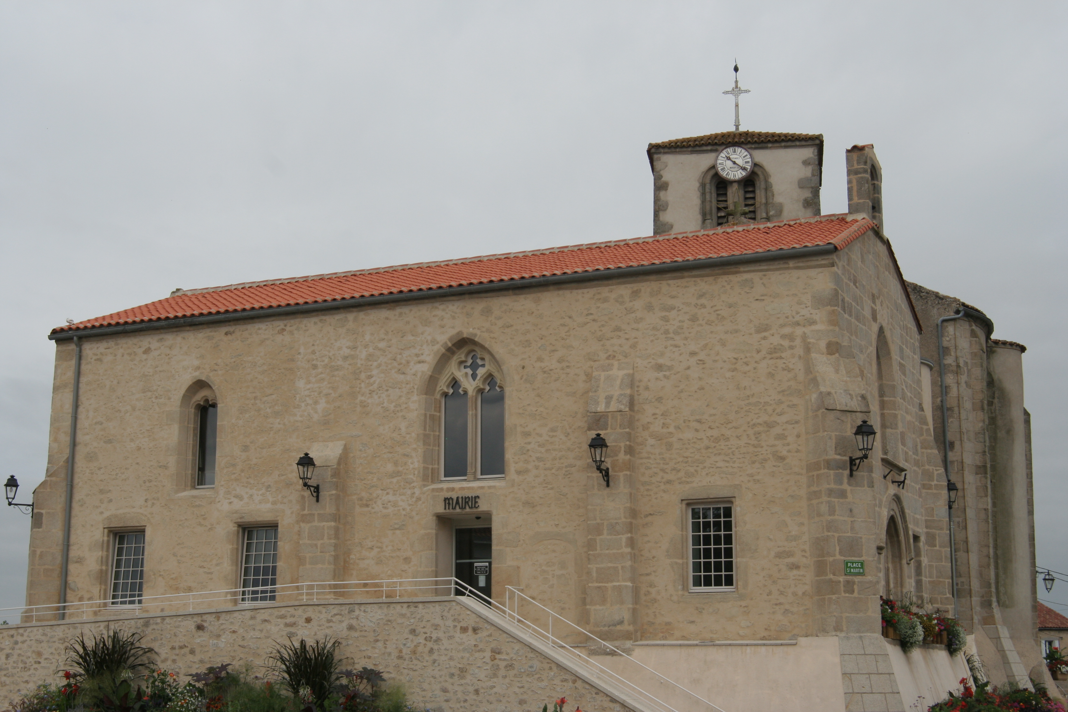 Mairie au chevet de l'église de Chiché. Il s'agit de l'ancienne chapelle Notre-Dame-de-Recouvrance.